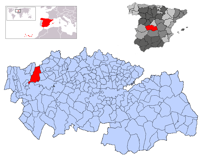 Velada en la provincia de Toledo